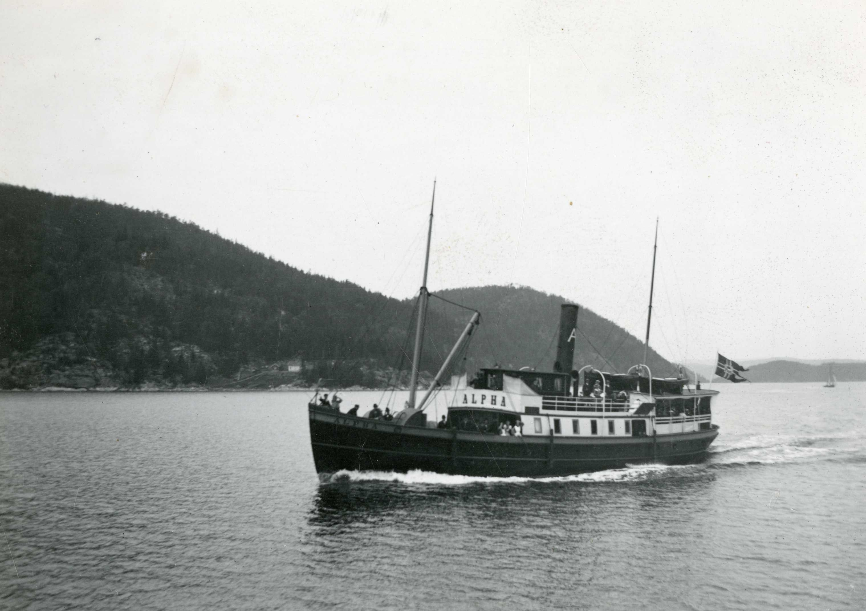 Dampskip, Oslofjorden